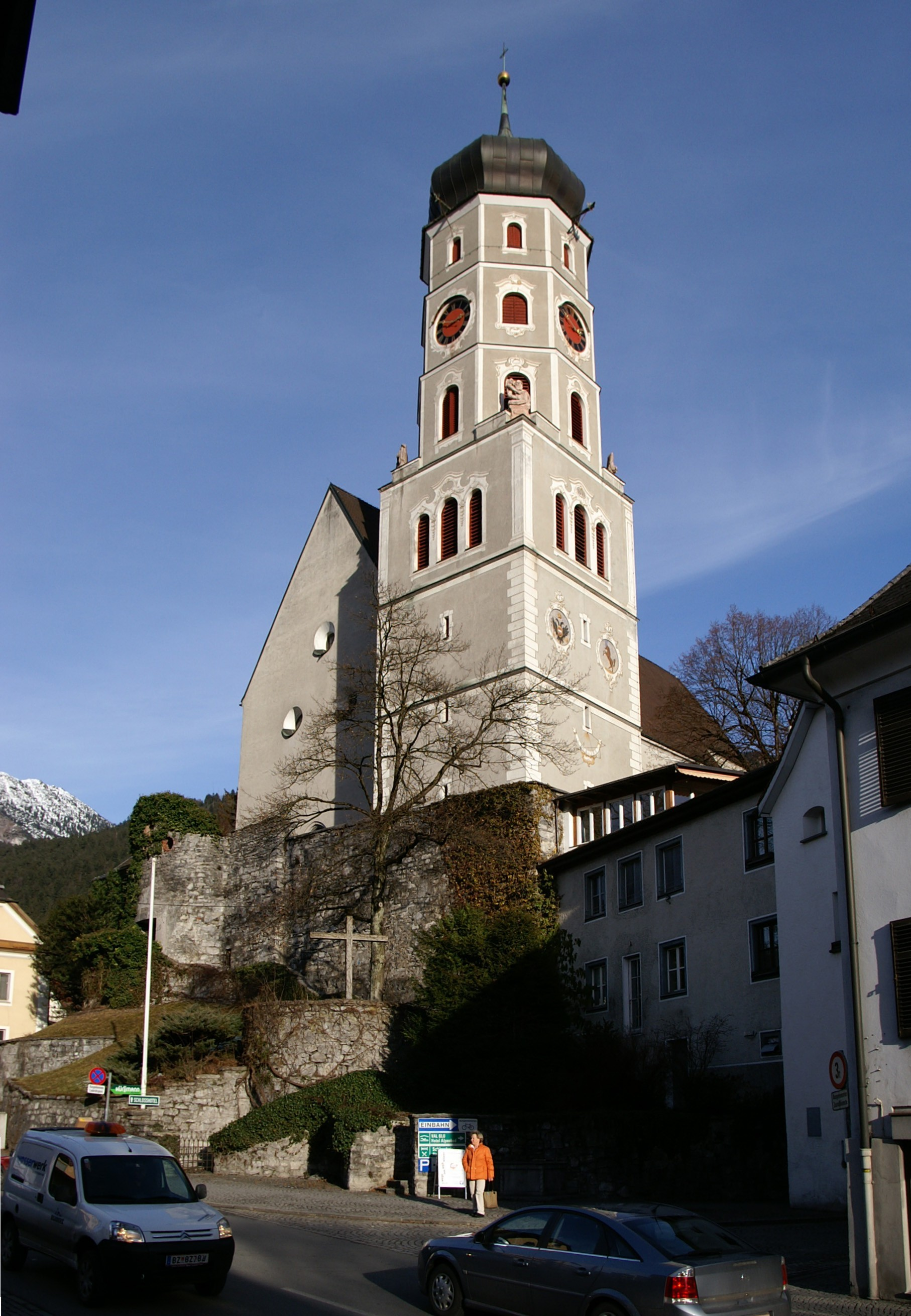 Kirche “Laurentiuskirche (Bludenz)” in Bludenz, Vorarlberg. Davor das begehbare Kriegerdenkmal von Alfons Fritz